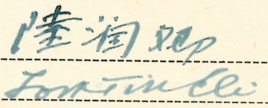 中文（中国大陆）: Look Tin Eli在1918年的签名